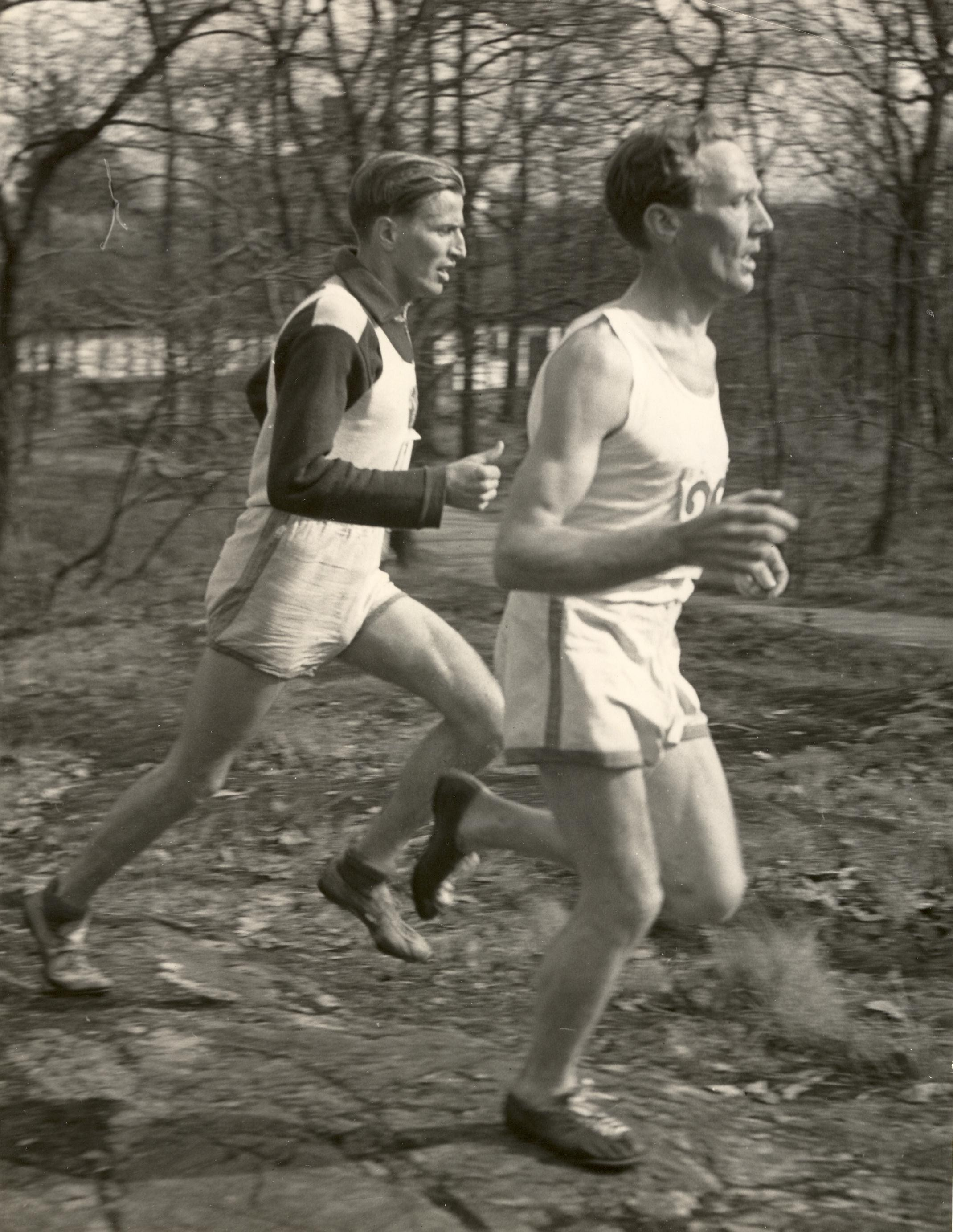 Severt Dennolf (left) and and Valter Nyström